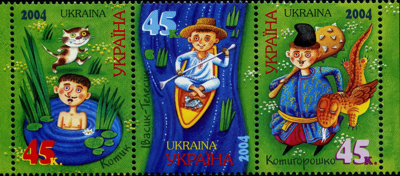 Українські народні казки. Видавництво "Марка України" 2004 р.